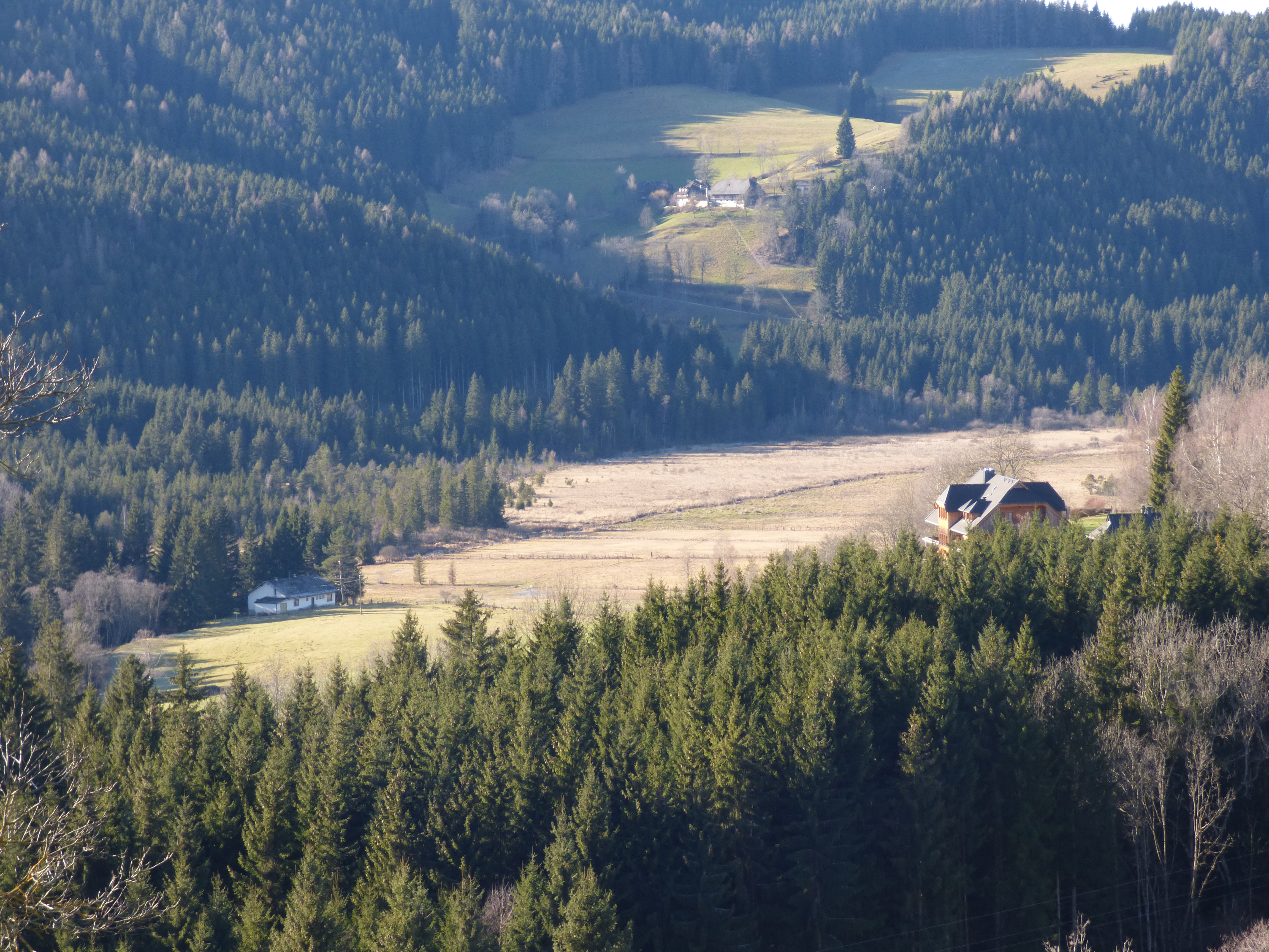 Freundsamer Moos, umgeben von den Häusern Graben Nr. 6 (links), Freundsam Nr. 1a (rechts), Gößeberg 3 und 4 (im Hintergrund am Hang)